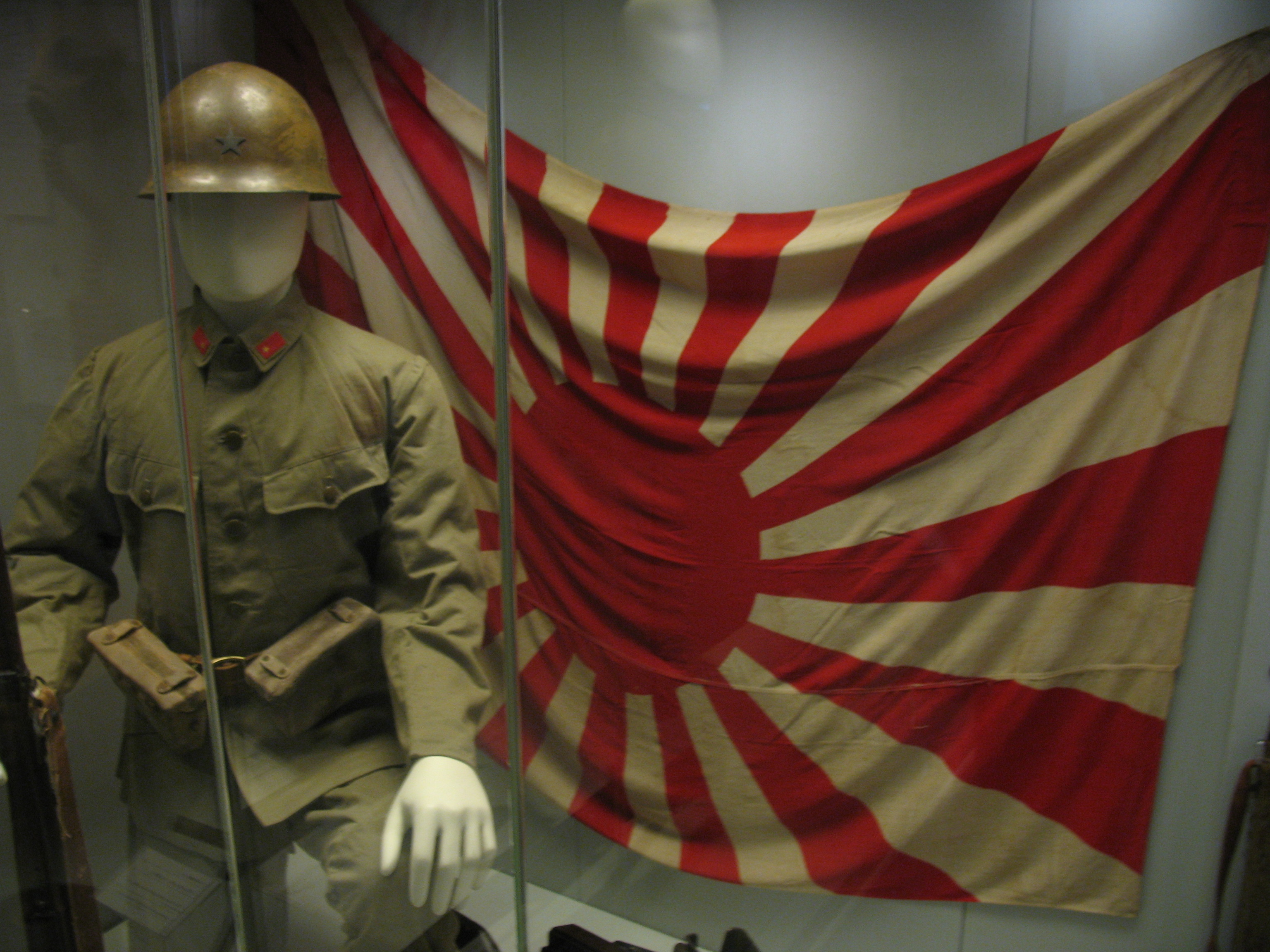 大日本帝国陸軍の軍旗